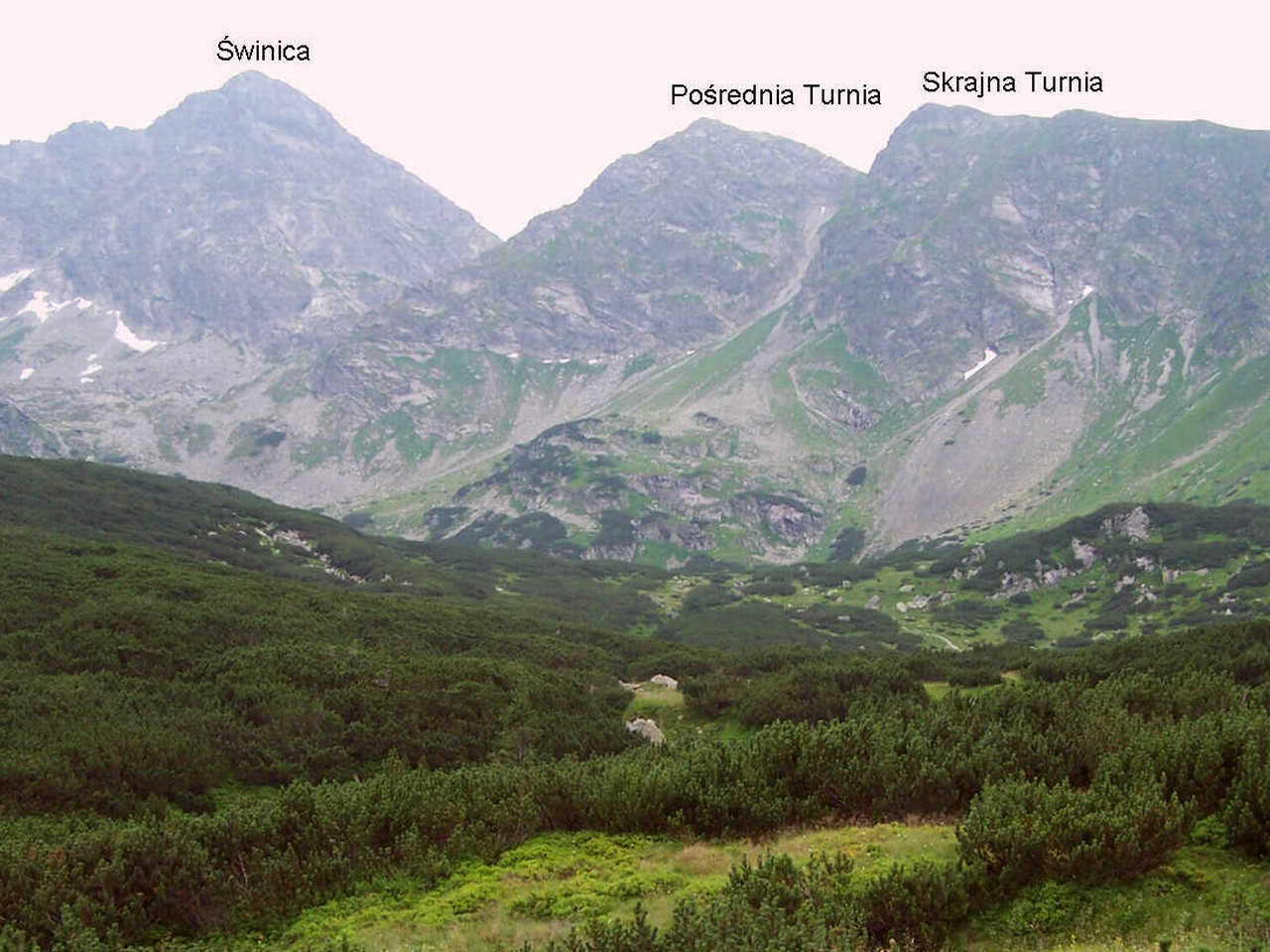 Pośrednia Turnia (Tatra Mountains)